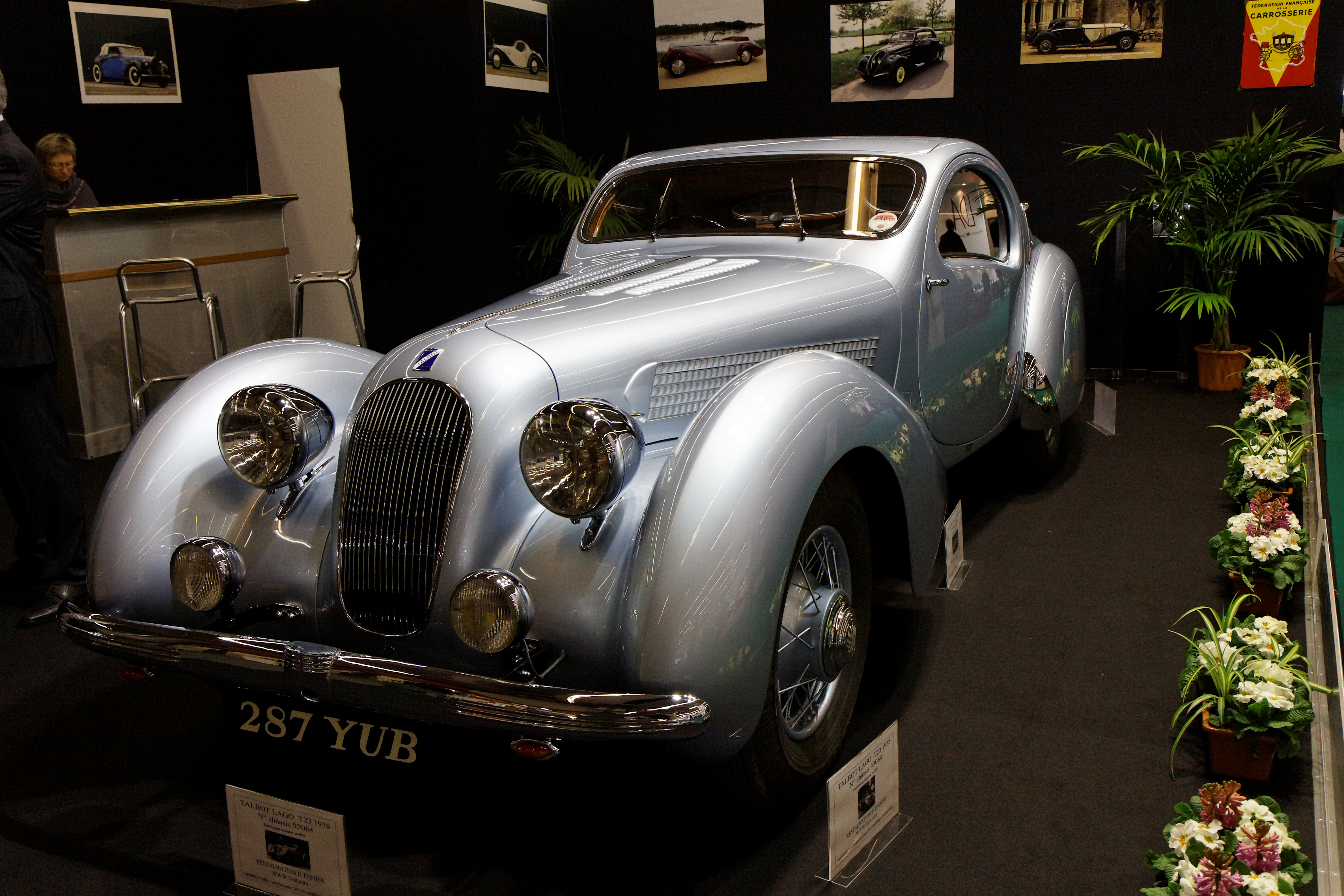 1938 Talbot T23 "Jeancart Teardrop Coupe" by Figoni & Falaschi, Chassis #93064; photographie prise lors du salon rétromobile 2011 à Paris, porte de Versailles.